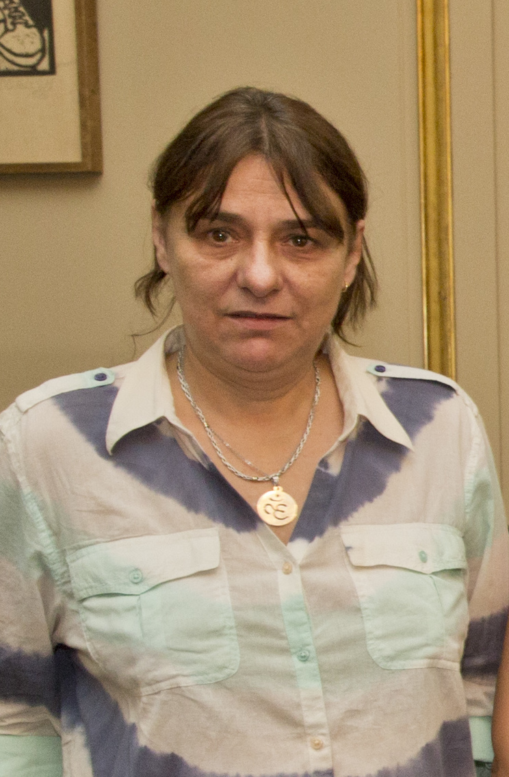 Buenos Aires, 24 de febrero de 2015.- Parodi se reunió con el Prof. Roberto Khatlab, Director del Centro de Estudios para Latinoamérica de la Universidad de Saint Esprit Kaslik, del Líbano, que visitó nuestro país para inaugurar el Proyecto de Digitalización del Patrimonio Cultural Histórico de la Comunidad Libanesa en Argentina llevado a cabo con la Fundación Ninawa Daher. También estuvieron presentes la Directora Nacional de Patrimonio y Museos, Araceli Bellota; y la Directora Nacional de Política Cultural y Cooperación Internacional, Mónica Guariglio y la presidenta de la Fundación Ninawa Daher, la Licenciada, Alicia Daher. Foto: Augusto Starita / Ministerio de Cultura de la Nación.